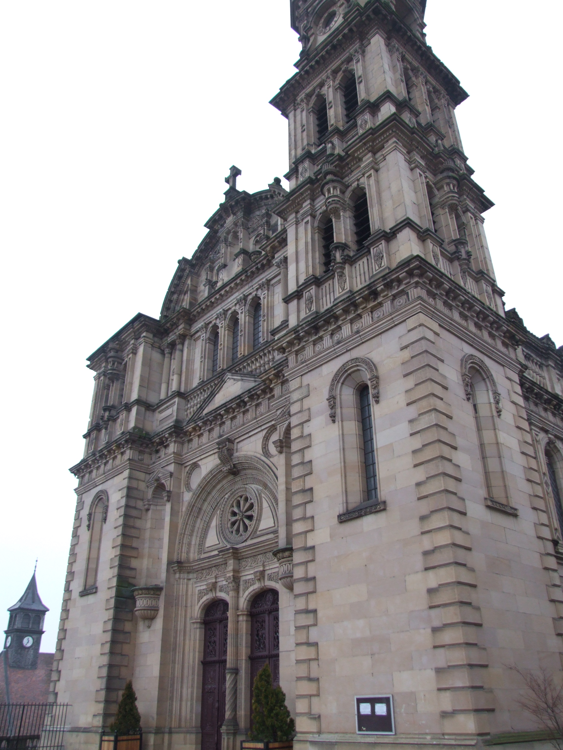 Église Saint-Maimbœuf, Montbéliard, Doubs, Franche-Comté, FRANCE